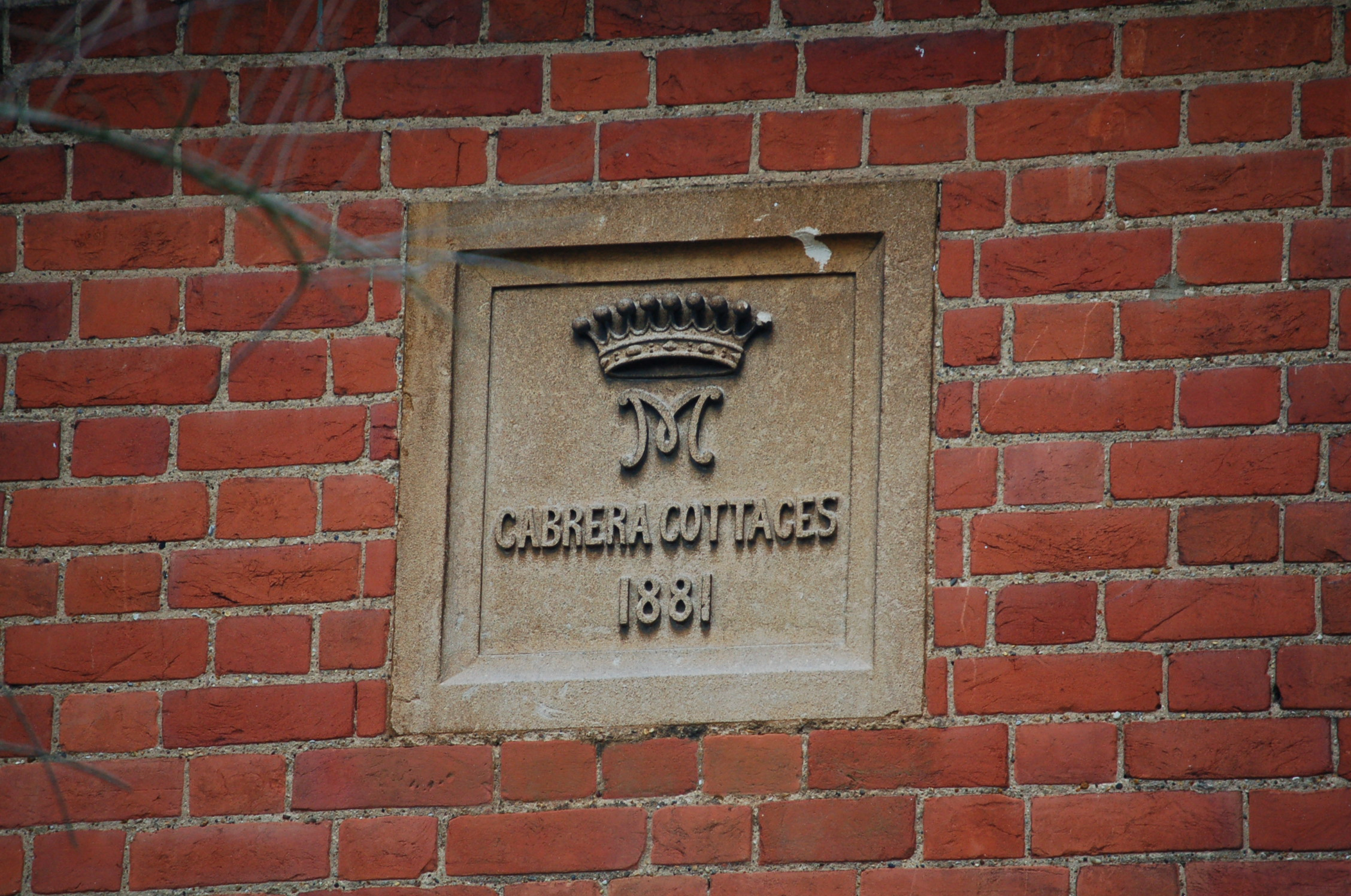 Cabrera Cottage 1881.GPJ